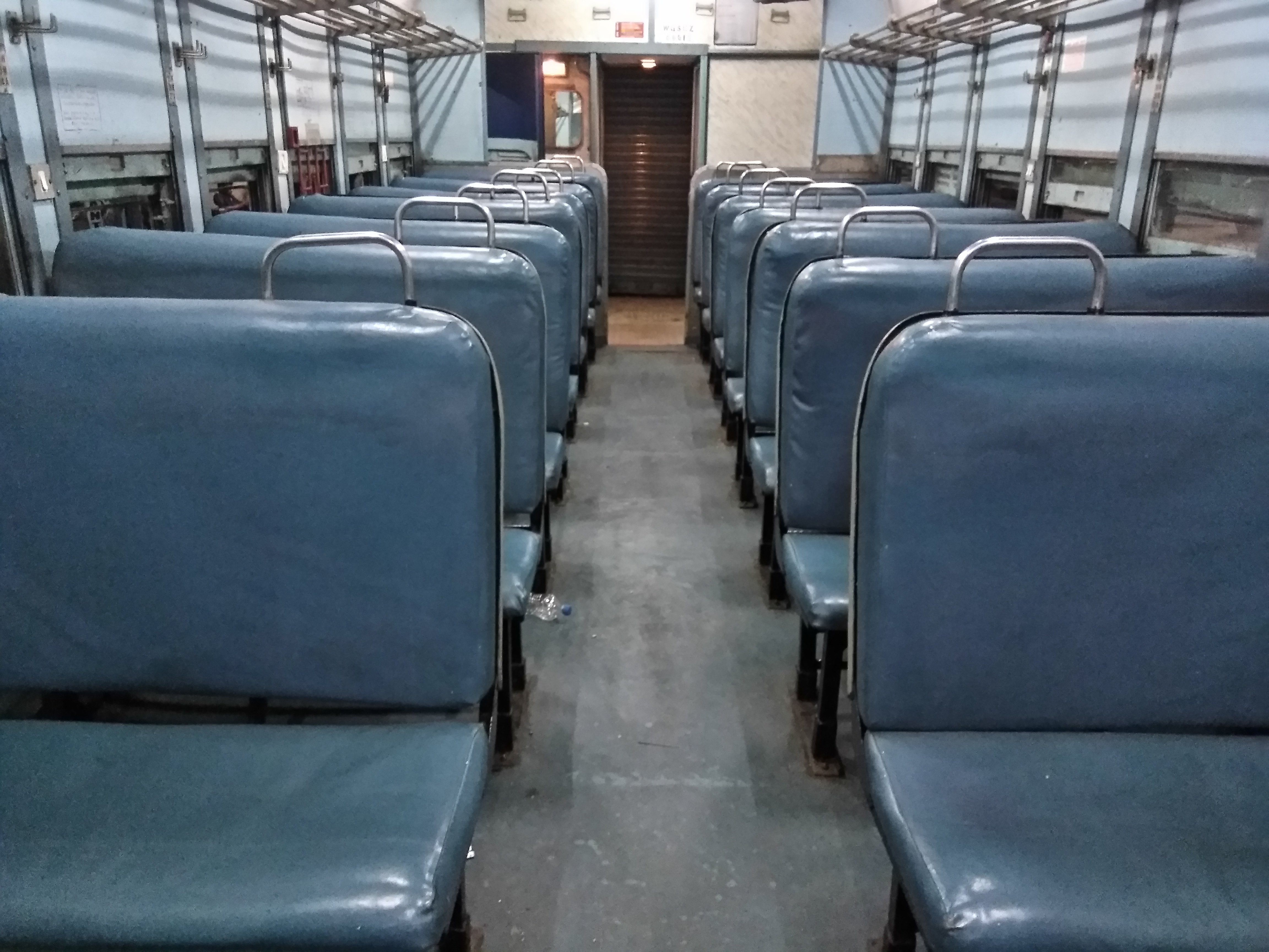 Seats of Indian railway train running in Kerala